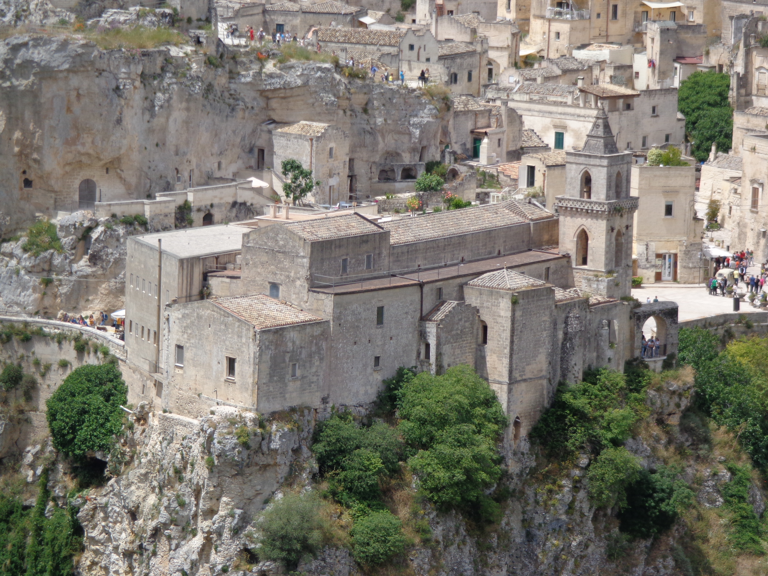 Chiesa di San Pietro Caveoso, Matera